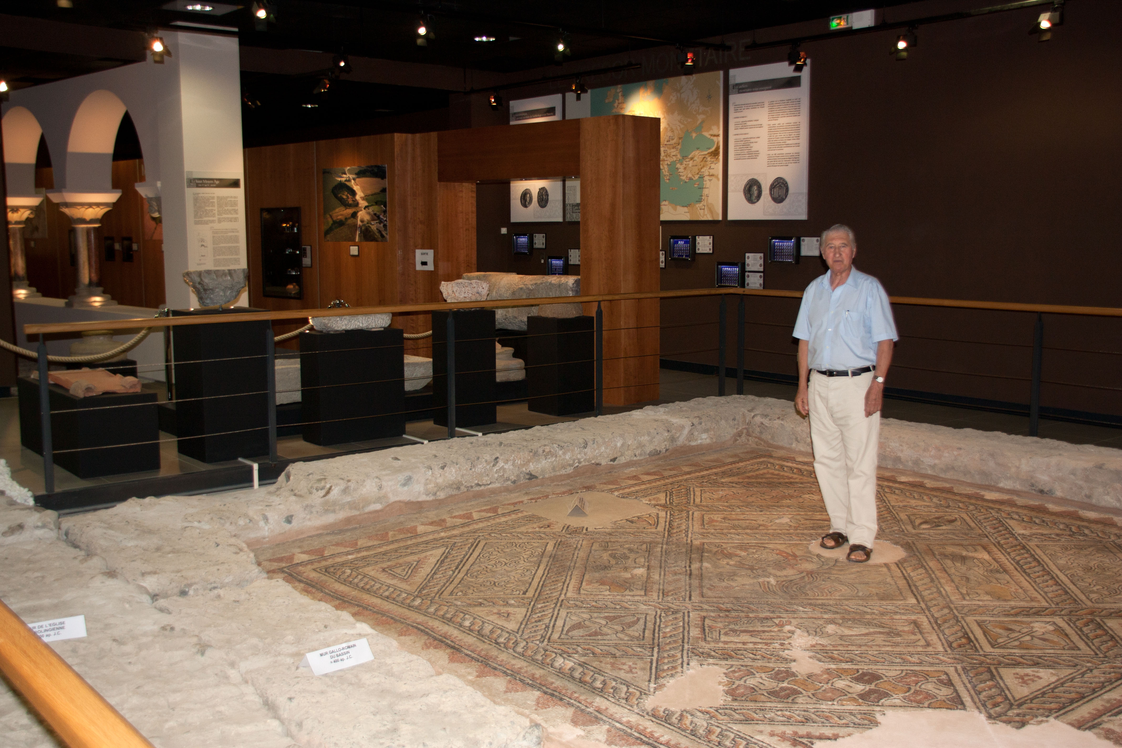 Sylvain Doussau, né le 19 novembre 1941 à Maubourguet, Hautes-Pyrénées, France. Archéologue amateur.